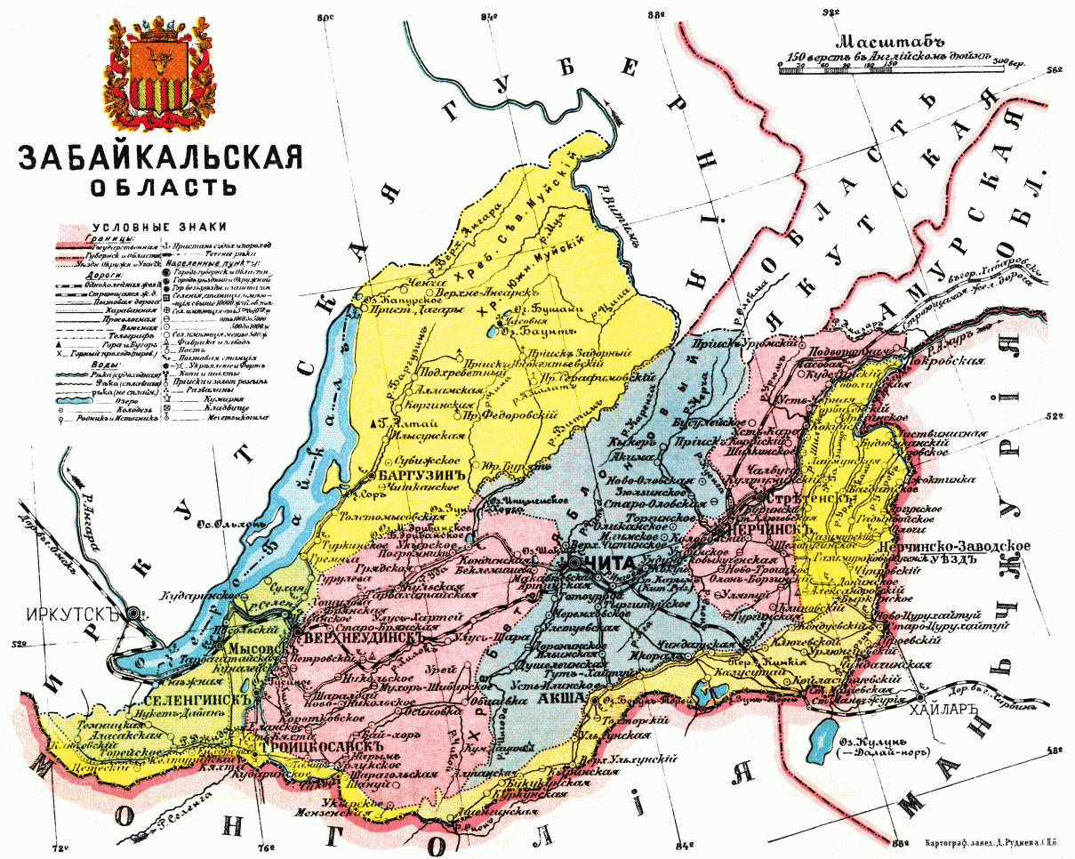 Карта Забайкальской области, 1913